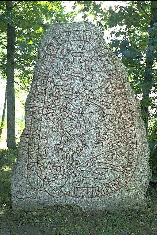 Inskriften lyder: Guve reste denna sten efter Olav, sin son , en mycket dugande ung man. Han blev dräpt i Estland. Håvard (?) högg stenen. Motiv: Vg181 Frugården, Olsbro Nyckelord: Runor Kategori: Runristning/runsten Inskriften lyder: Guve reste denna sten efter Olav, sin son , en mycket dugande ung man. Han blev dräpt i Estland. Håvard (?) högg stenen.